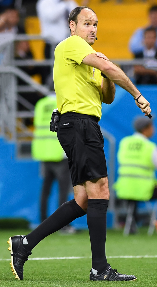 Сборная Исландии уступает Хорватии и покидает ЧМ-2018